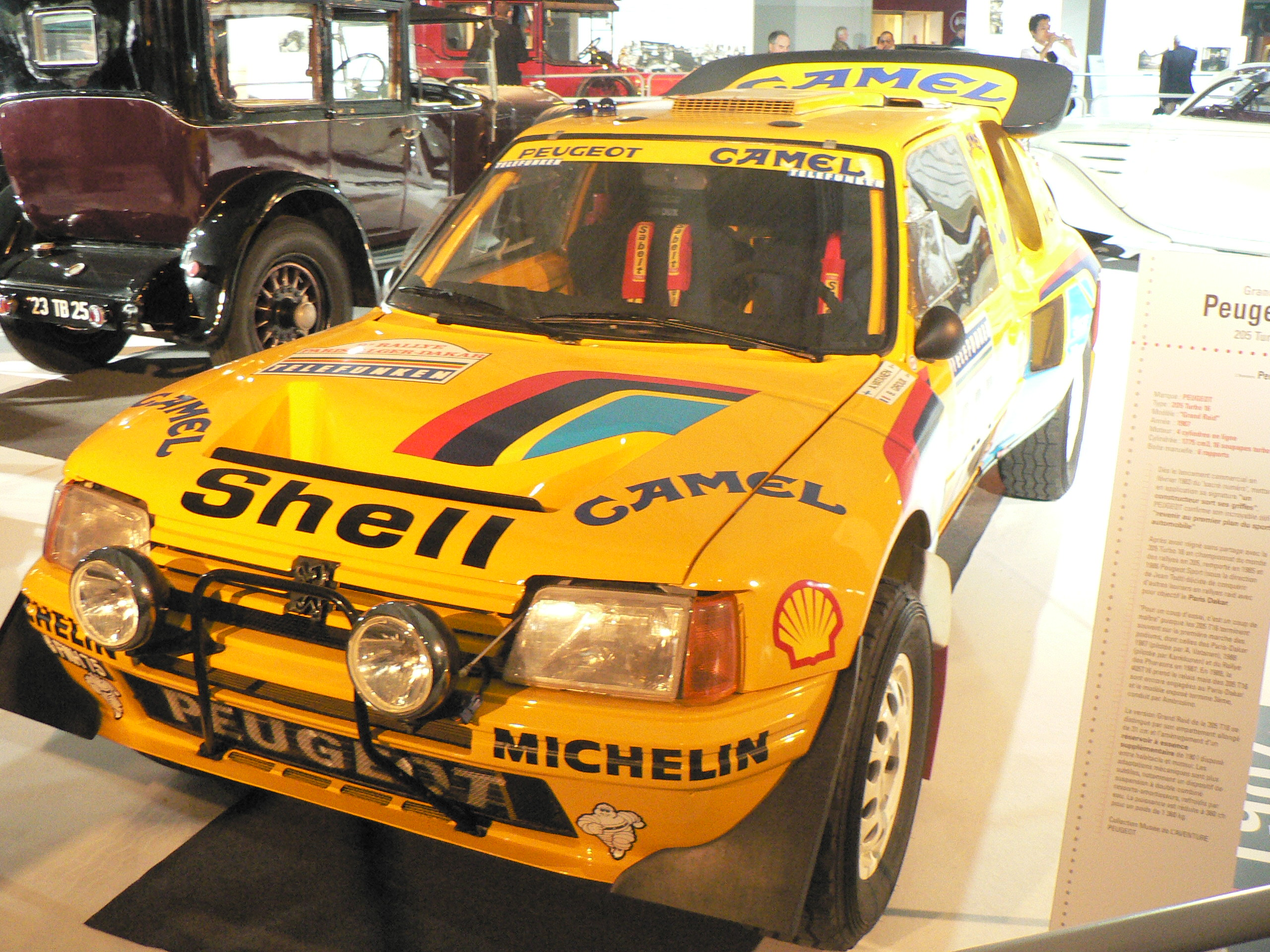 Mondial de l automobile de Paris (October 2006)